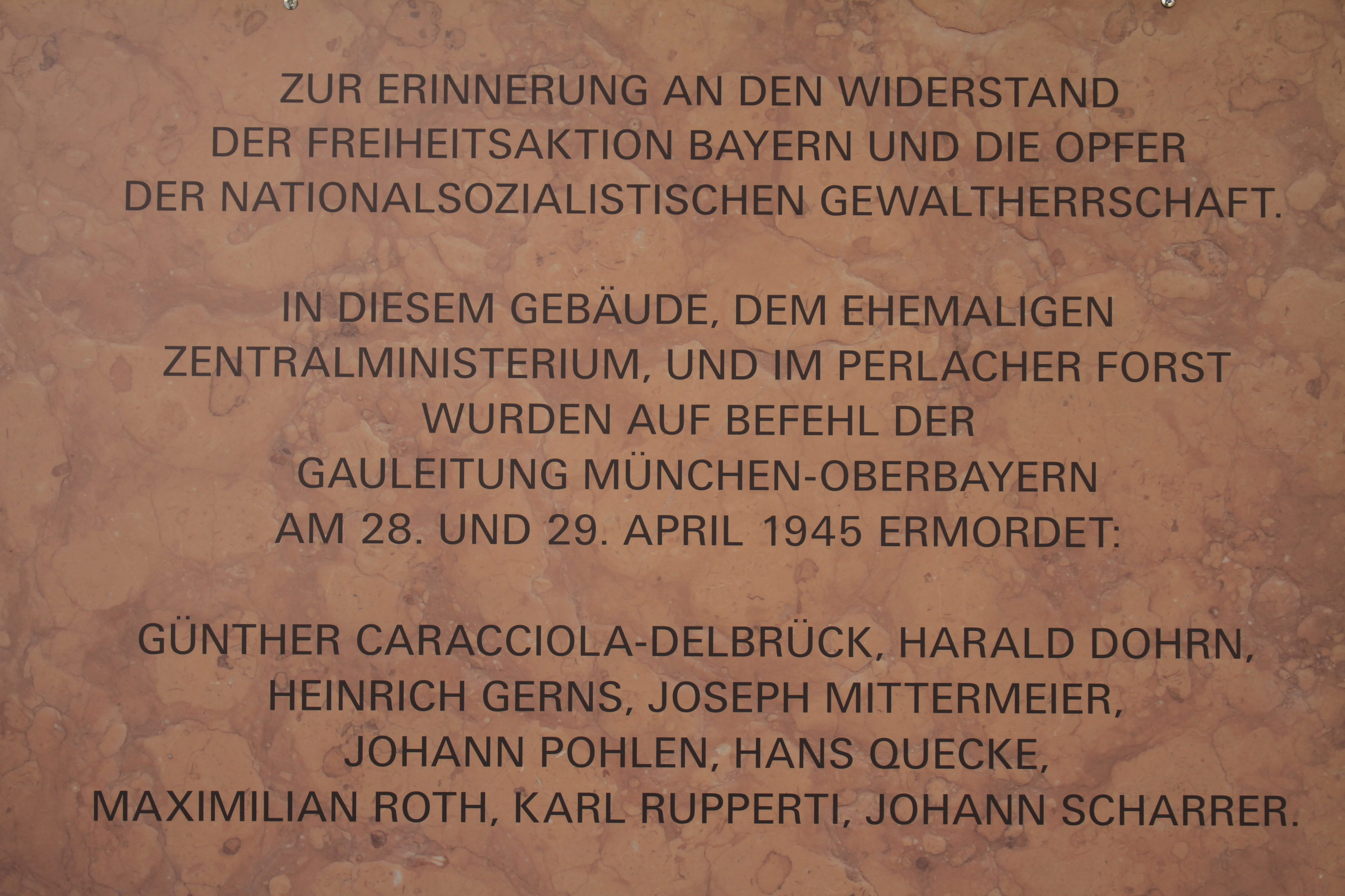 Gedenktafel an die Ermordeten der Freiheitsaktion Bayern, im Innenhof des Landwirtschaftministerium, München, Bayern